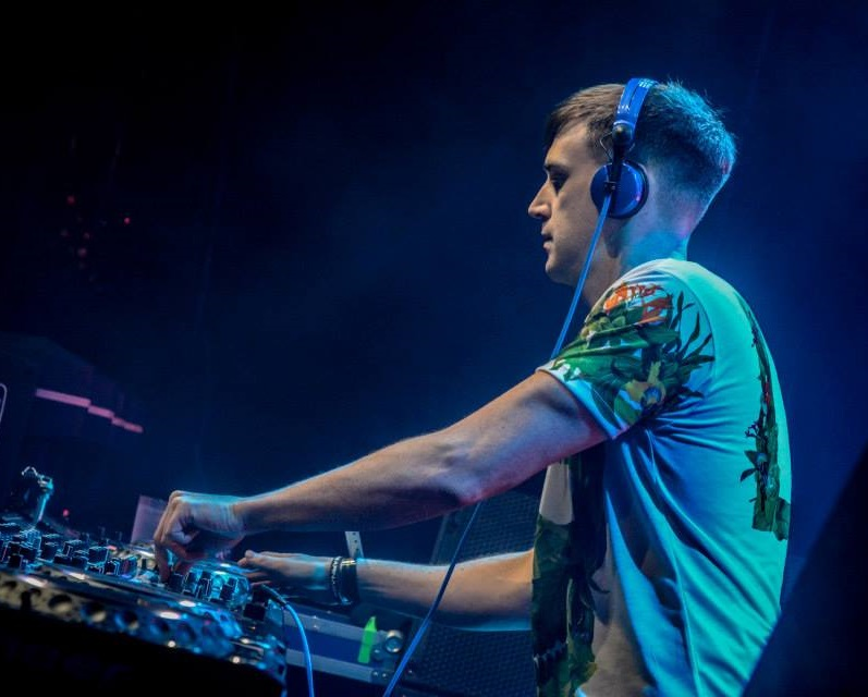 Bryan Kearney A State Of Trance Festival 700 Argentina